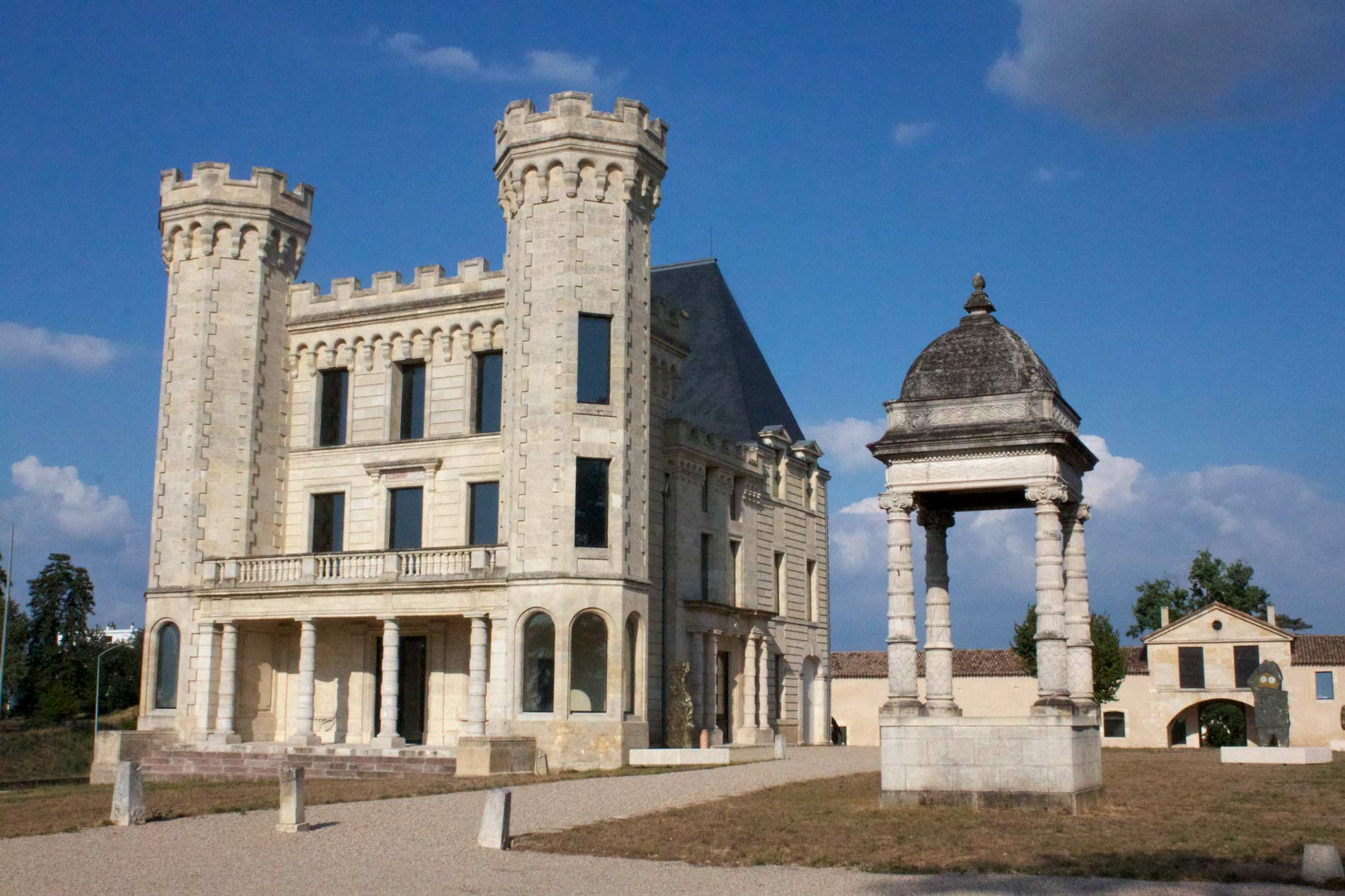 Château de Lormont ou château des Archevêques (Lormont, Gironde, France) .